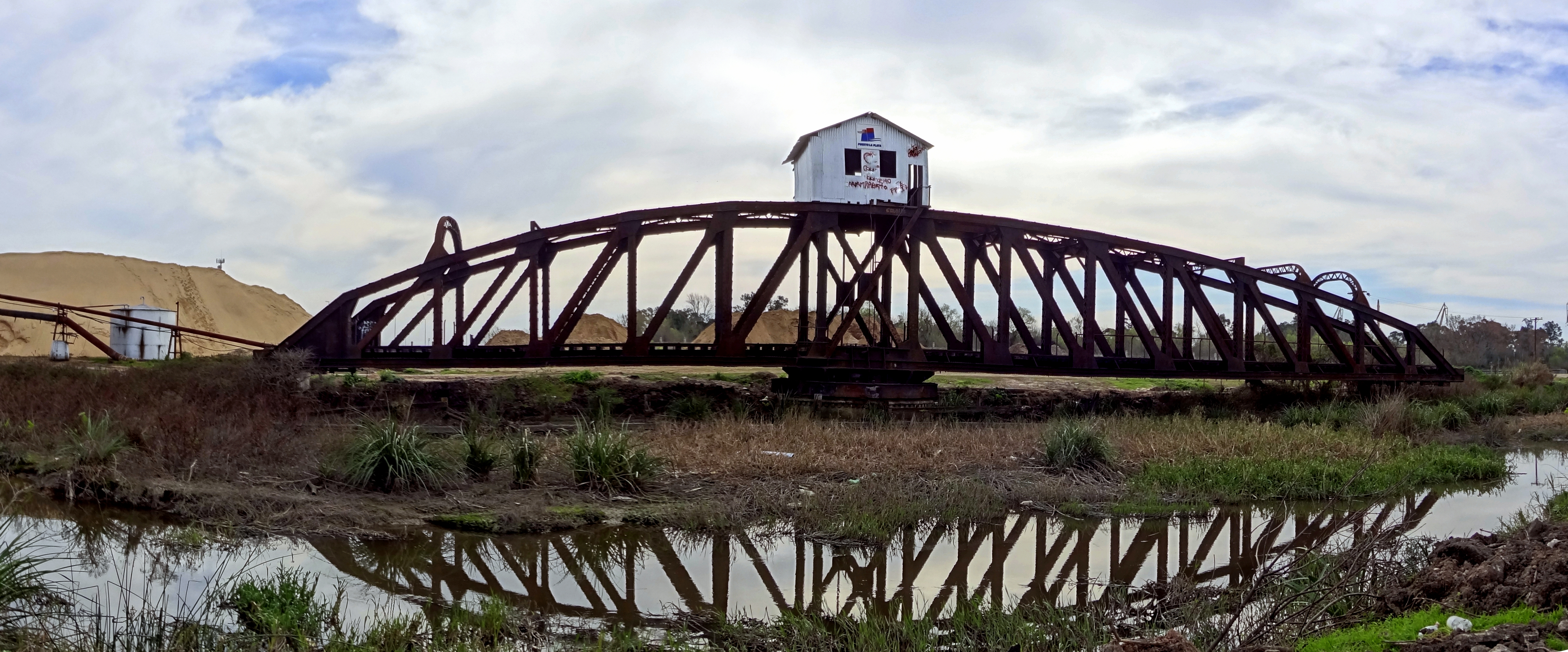 Puente Giratorio asentado en el Canal Oeste